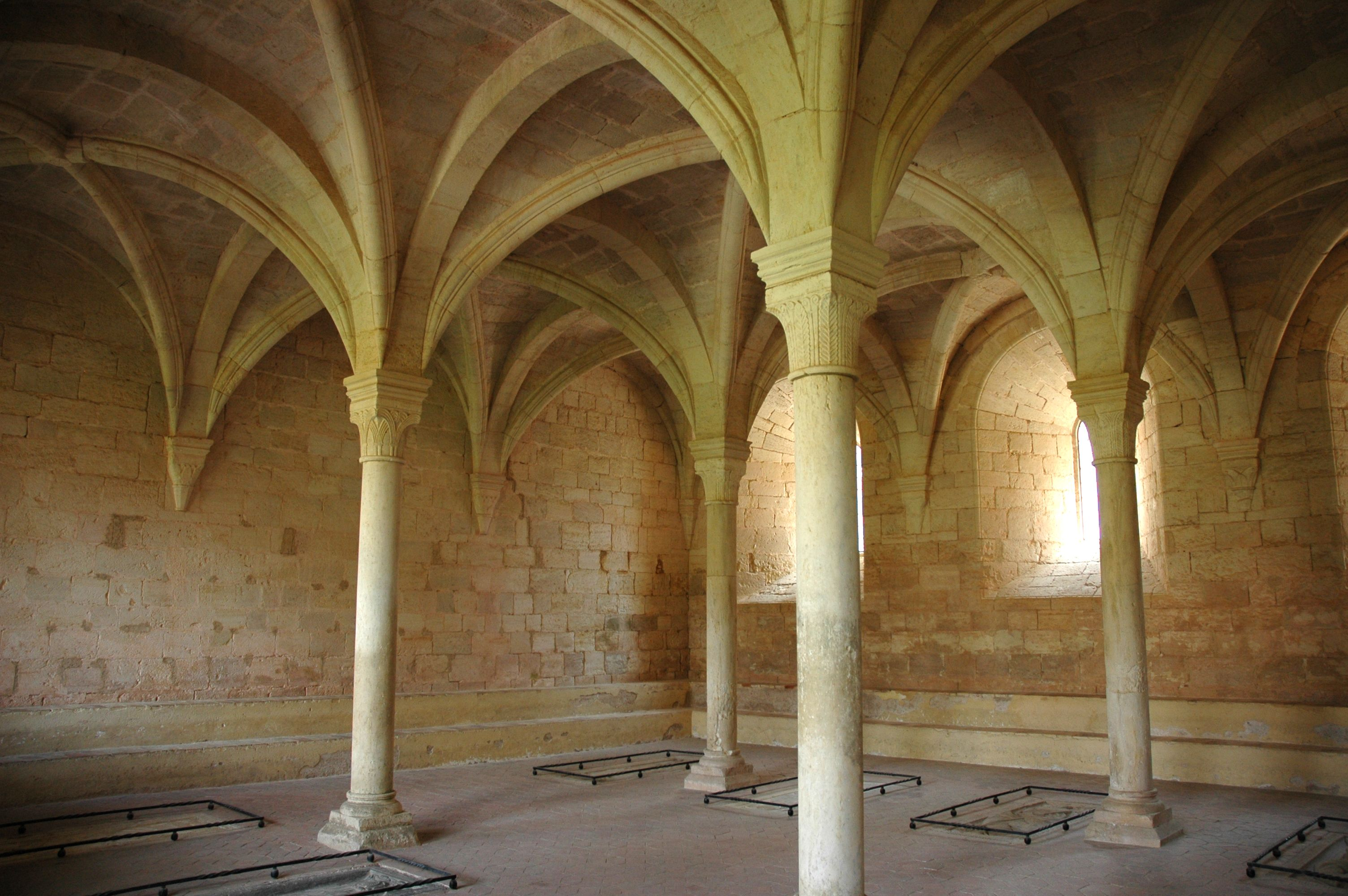 Monestir de Santes Creus - Sala Capitular